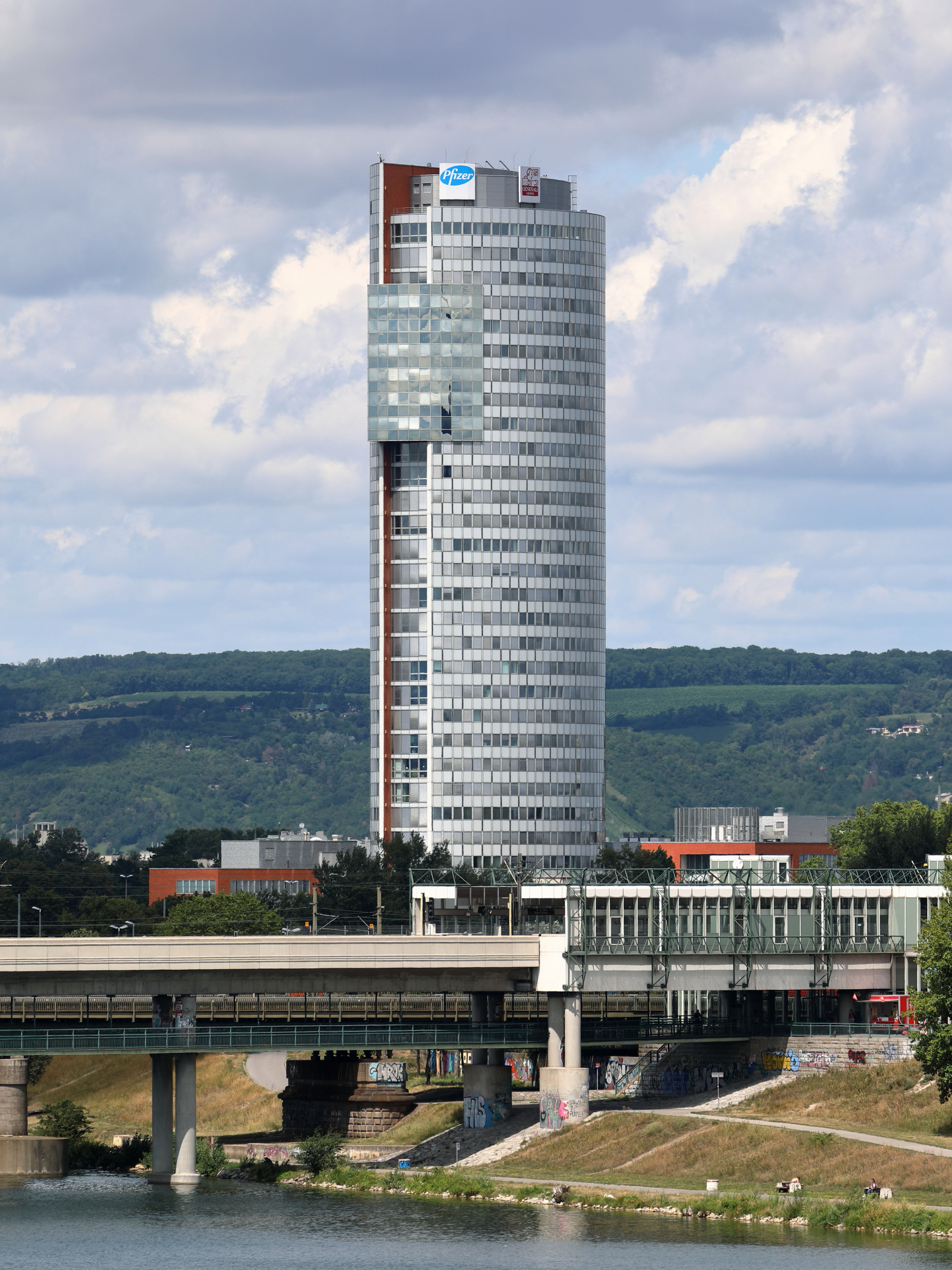 Blick von der Brigittenauer Brücke auf den Florido Tower im 21. Wiener Gemeindebezirk Floridsdorf.Das Bürohochhaus wurde von 1999 bis 2001 nach Entwürfen der Architekten Andreas und Herbert Müller-Hartburg errichtet. Das Gebäude zählt mit einer Höhe von 113 Metern zu den höchsten Bauwerken Wiens. Es verfügt über eine Nutzfläche von rund 36.000 m², die sich auf 31 Geschosse verteilen.